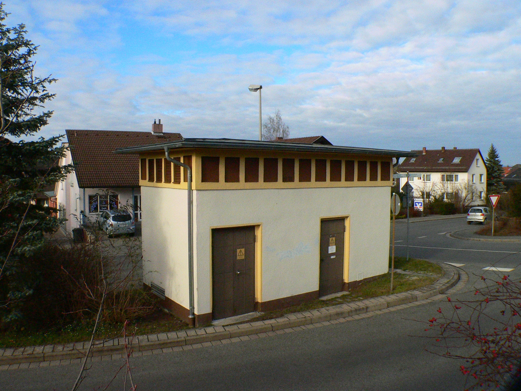 Coburg Stadtteil Scheuerfeld, Trafostation vom 1913